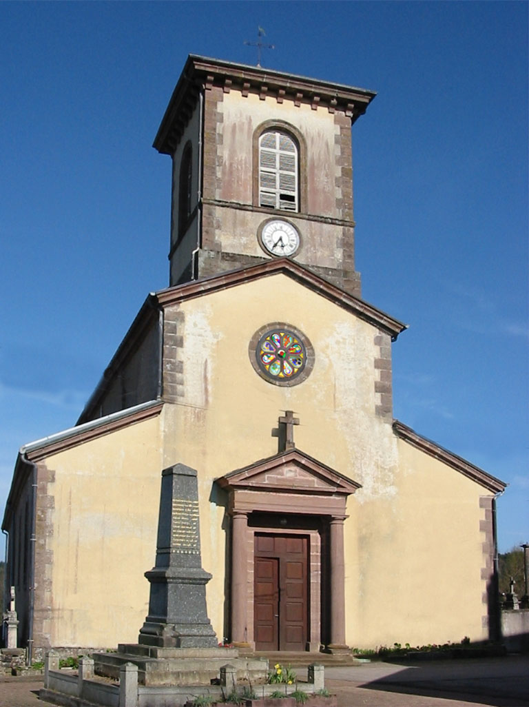 Eglise de Mortagne